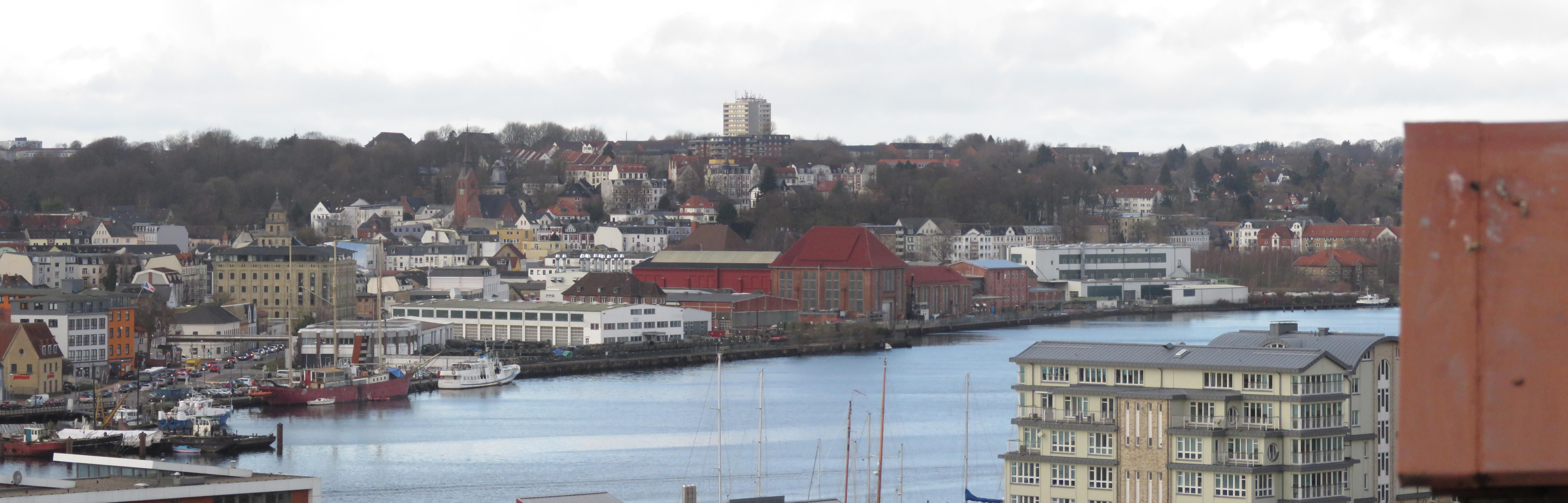 Panorama auf die Neustadt